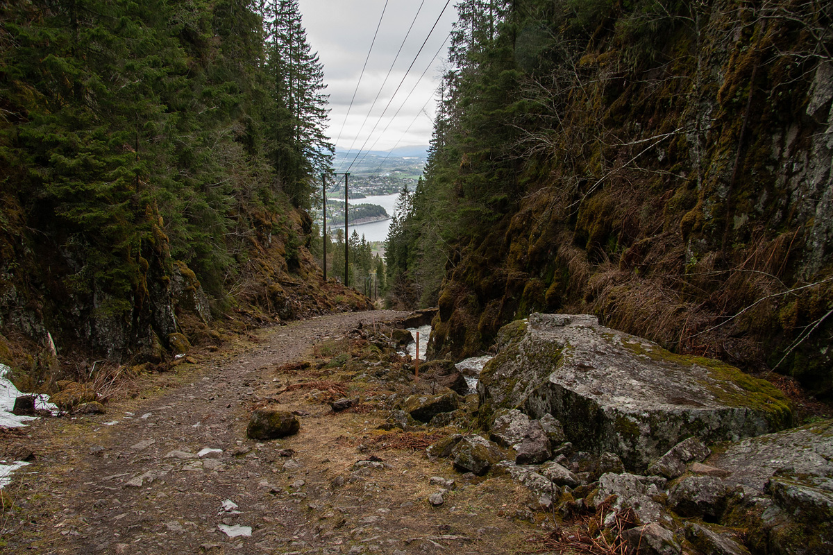 Krokkleiva med «Malesteinen» til høyre.